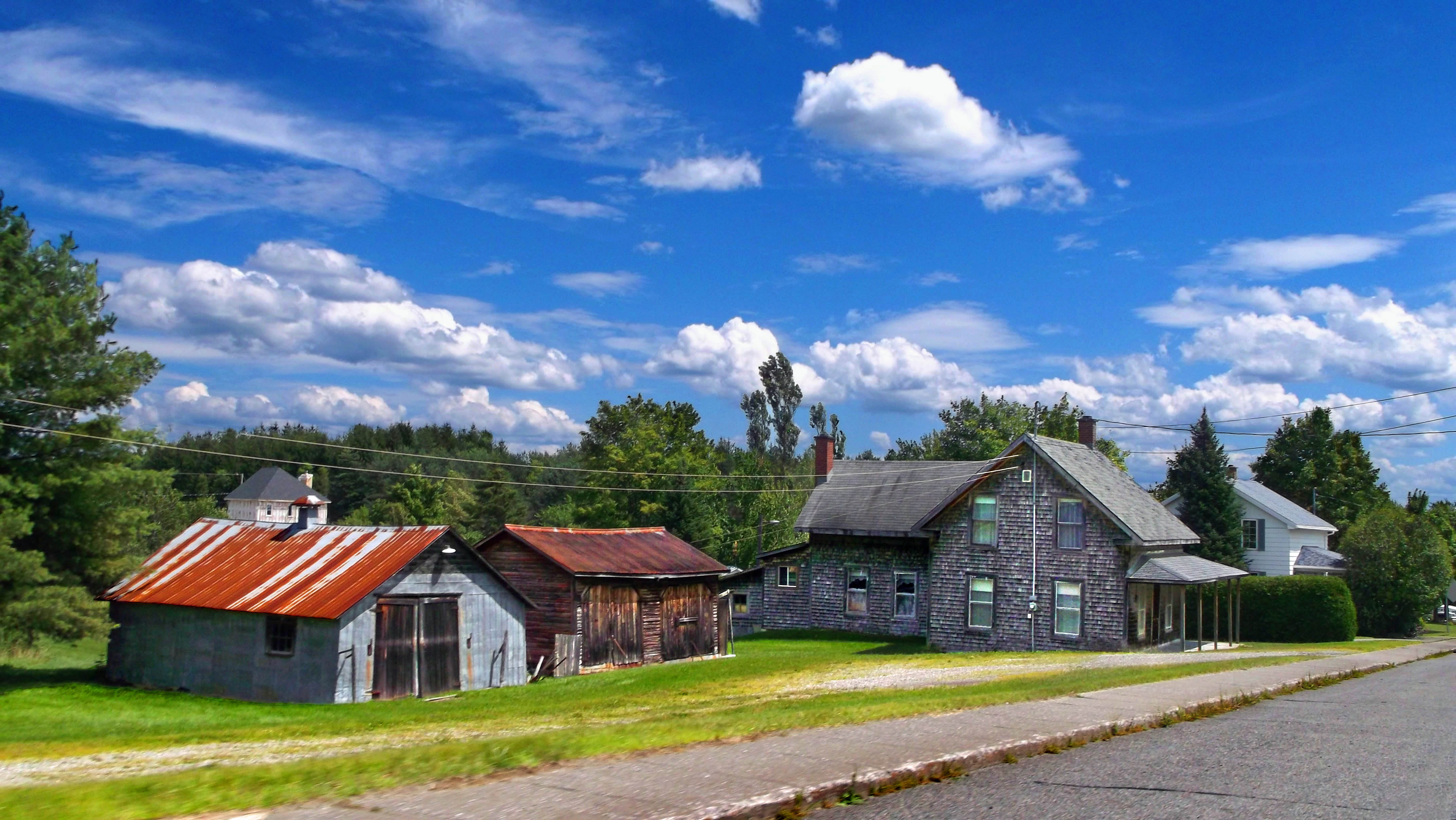 Vieux batiements a St Denis de Brompton